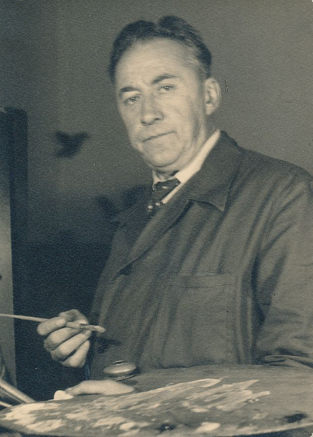 Malíř František Hofman, foto z pol. 20. století